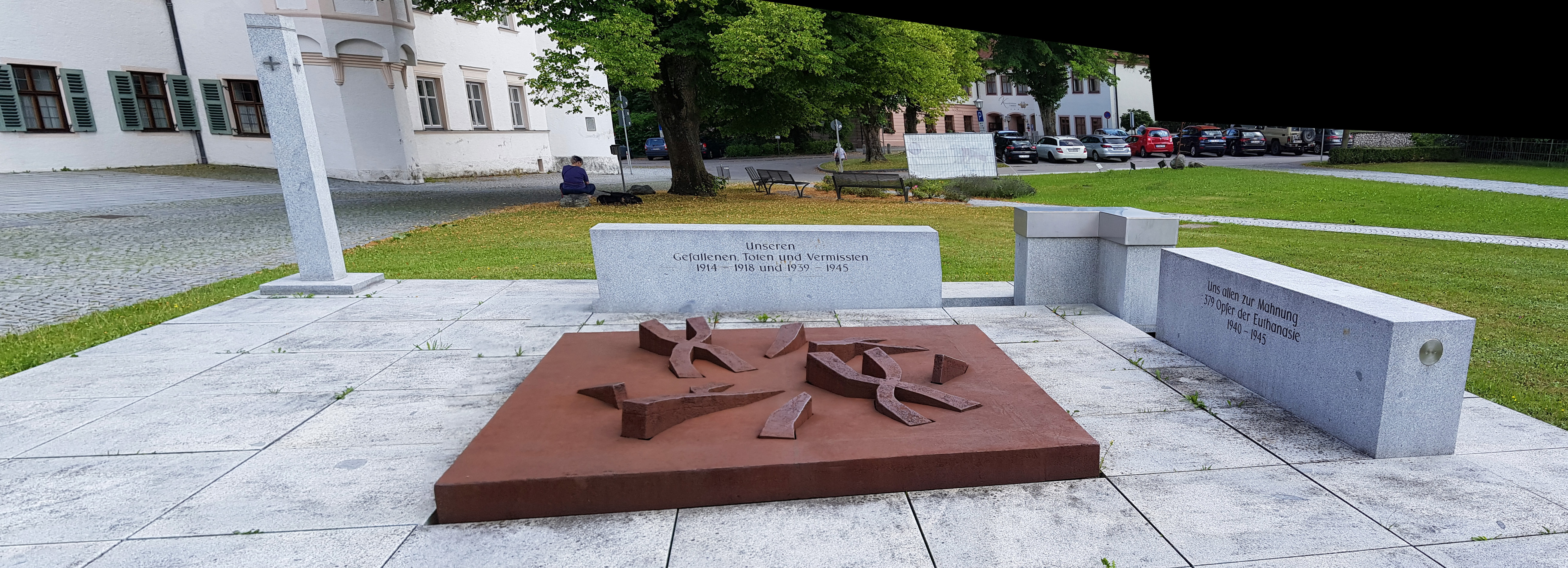 Bayern, Regierungsbezirk Schwaben, Landkreis Günzburg, Kloster Ursberg, Bodendenkmal im Klosterhof für die in den Weltkiegen gestorbenen sowie an die Euthanasieopfer im 3. Reich